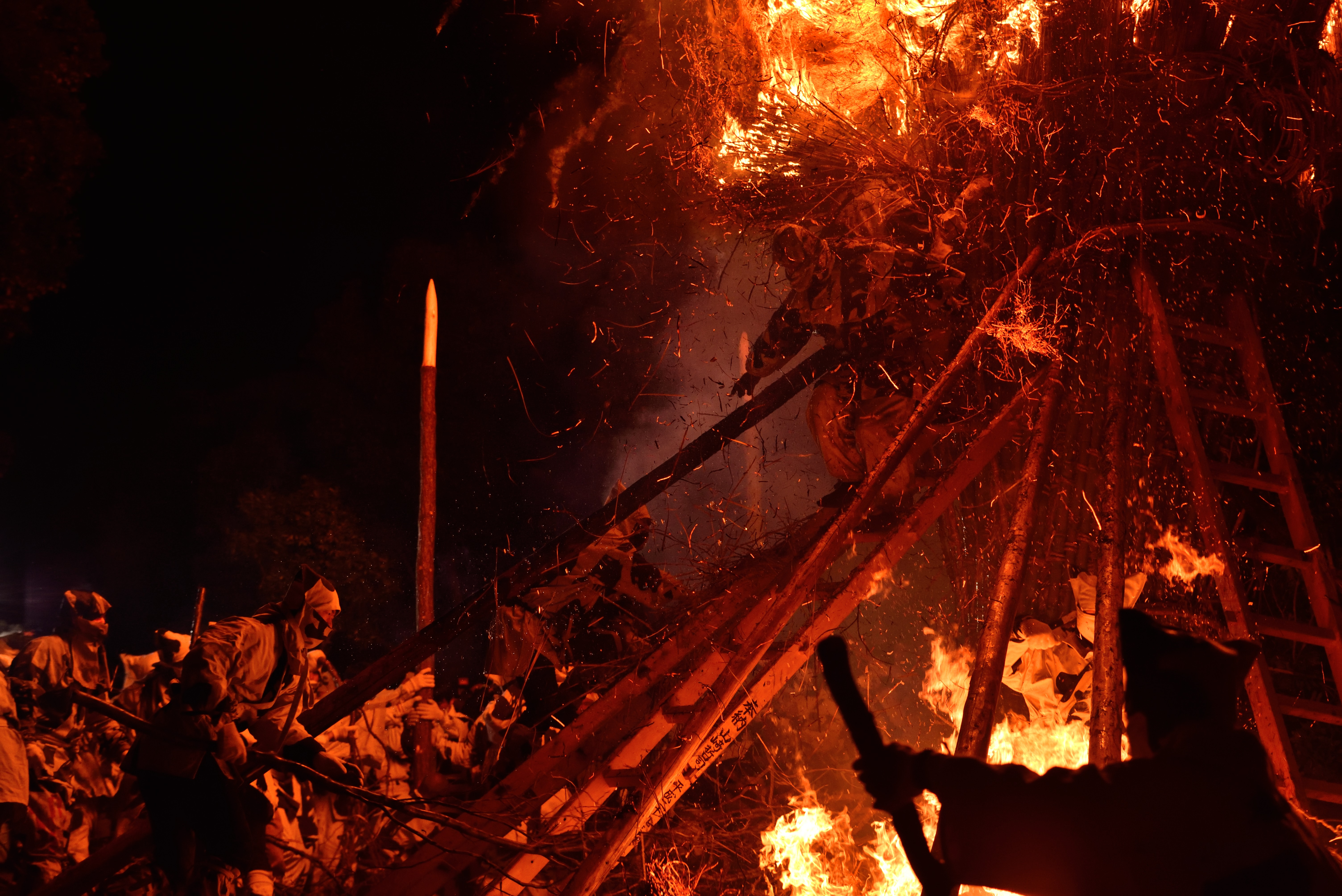 鳥羽の火祭り Nikon D750